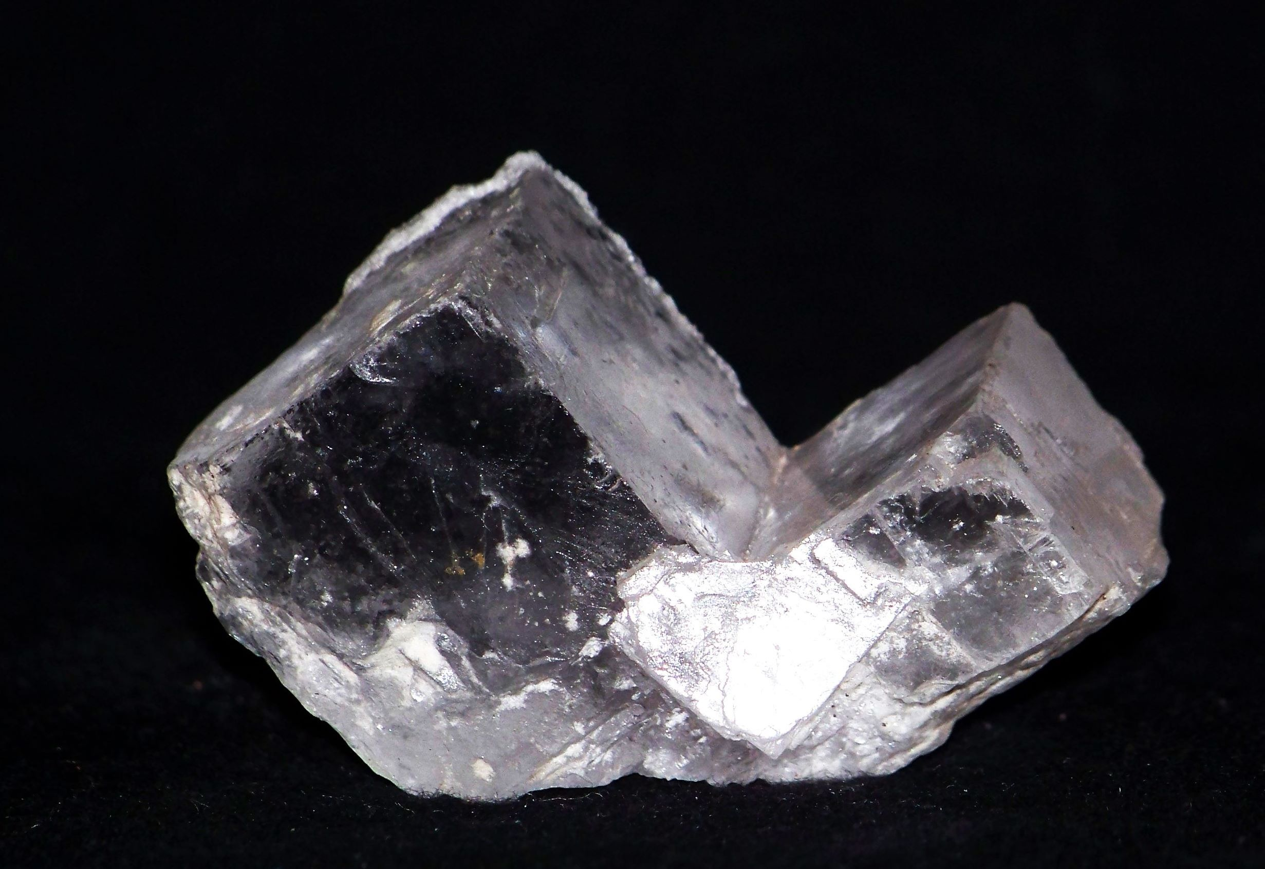 Kryształy hality, kop. Bochnia